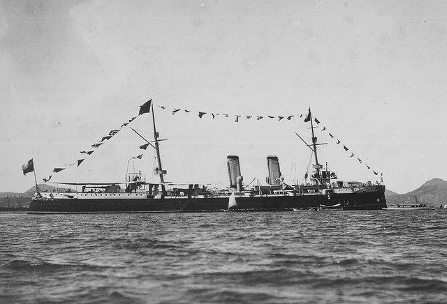 Crucero Chacabuco 3º Foto del Crucero Chacabuco 3º durante su visita a Río de Janeiro, Brasil, que realizara en 1902 para transportar a Chile los restos de diplomáticos chilenos que habían fallecido en Rio. Fotografía tomada por Ferrez perteneciente al álbum de propiedad de G. Berger y publicada en Internet por “Histarmar”.